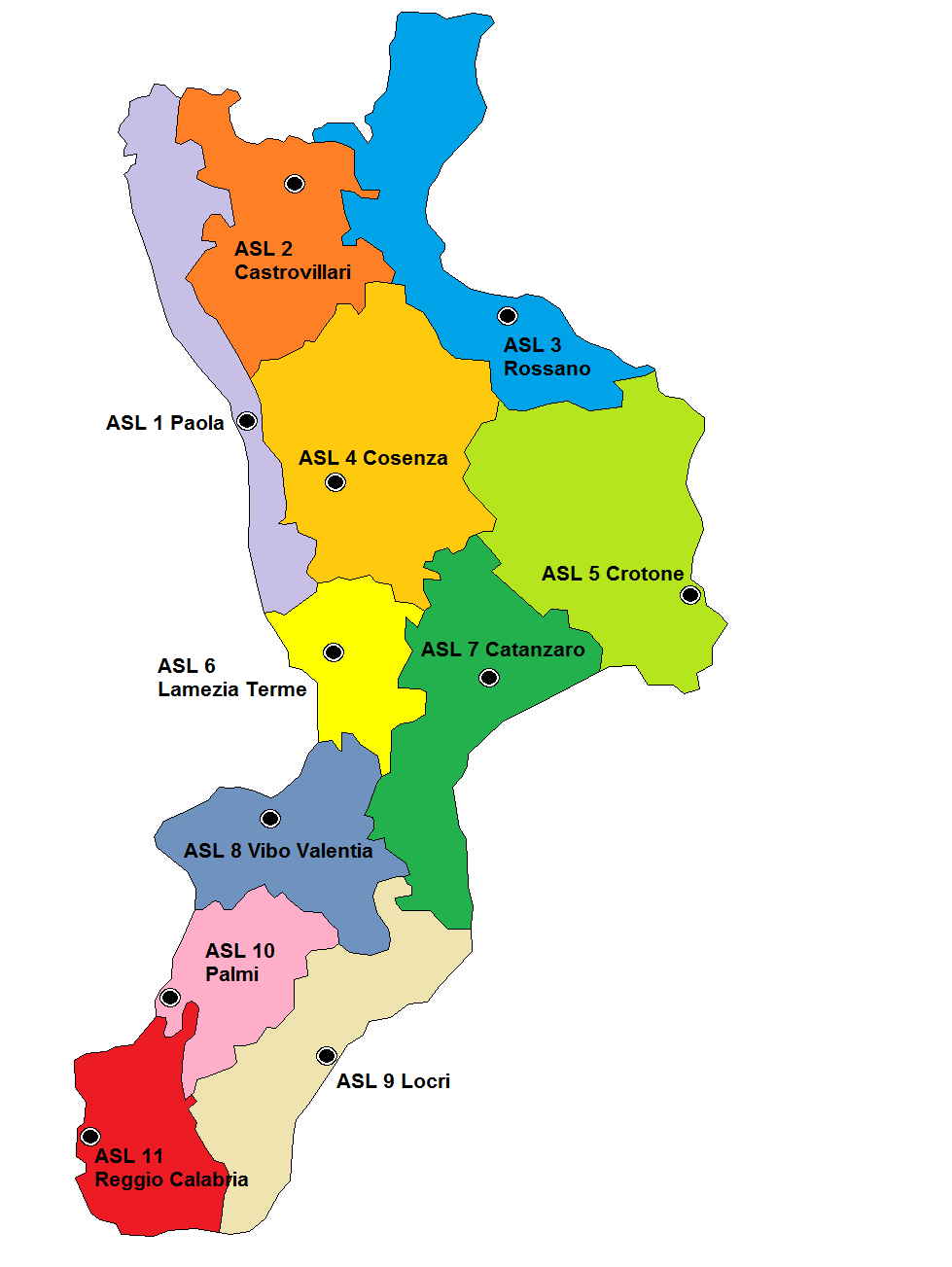 Prima della riforma del 2007 la Regione Calabria era suddivisa nelle seguenti Aziende Sanitarie Locali: ASL 1 Paola; ASL 2 Castrovillari; ASL 3 Rossano; ASL 4 Cosenza; ASL 5 Crotone; ASL 6 Lamezia Terme; ASL 7 Catanzaro; ASL 8 Vibo Valentia; ASL 9 Locri; ASL 10 Palmi; ASL 11 Reggio Calabria.